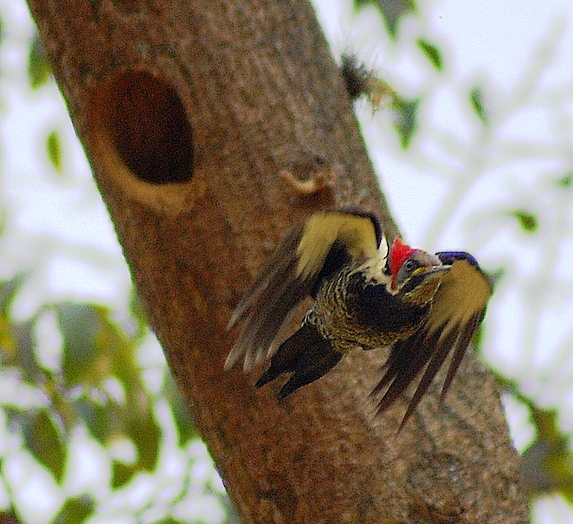 Dryocopus lineatus, Jardim Botânico de São Paulo